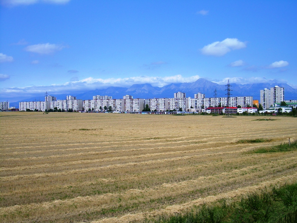 Poprád városa, háttérben a Tátra